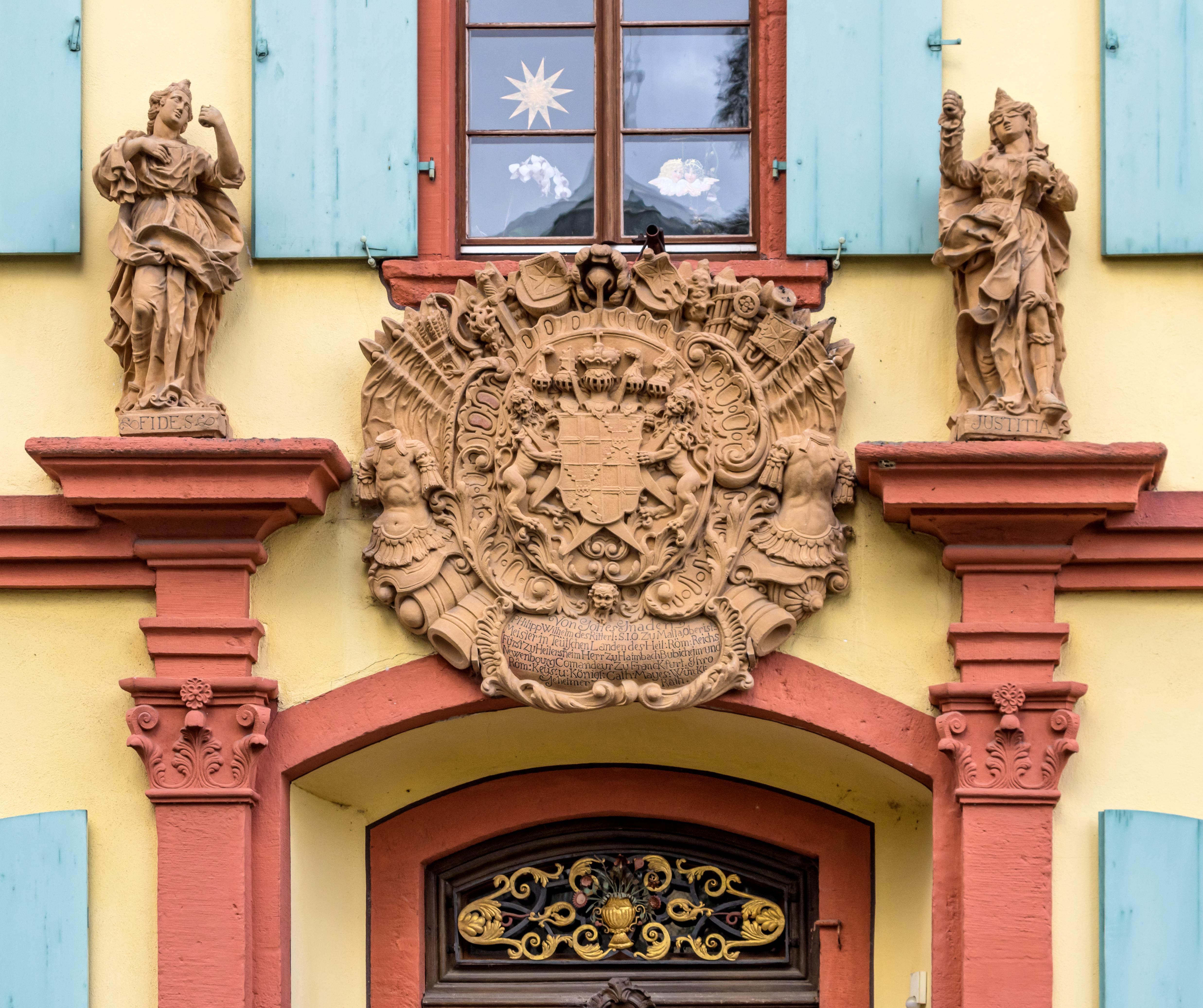 Bilder aus Heitersheim Das ehemalige Malteserschloss Heitersheim, jetzt im Besitz des Ordens der barmherzigen Schwestern vom Hl. Vinzenz von Paul Das Portal der Kanzlei des Heitersheimer Malteserschlosses von Johann Baptist Sellinger. Details